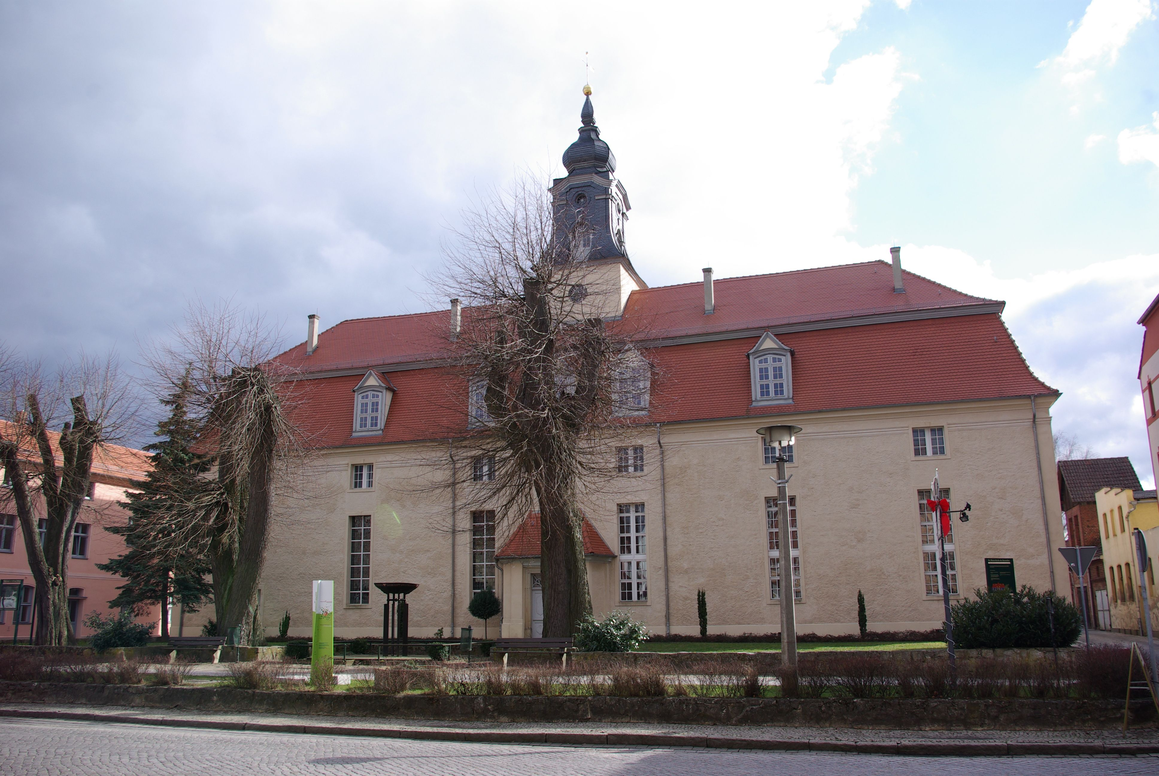 Dahme/Mark in Brandenburg. Das ehemalige Hospitalkirche wurde als Karmeliterkirche um 1300 gegründet. Ihr heutiges Aussehen erhielt sie durch einen barocken Umbau in den 1730er Jahren. 1924 wurde der Innenraum der Kirche auf den westlichen Teil verkleinert.